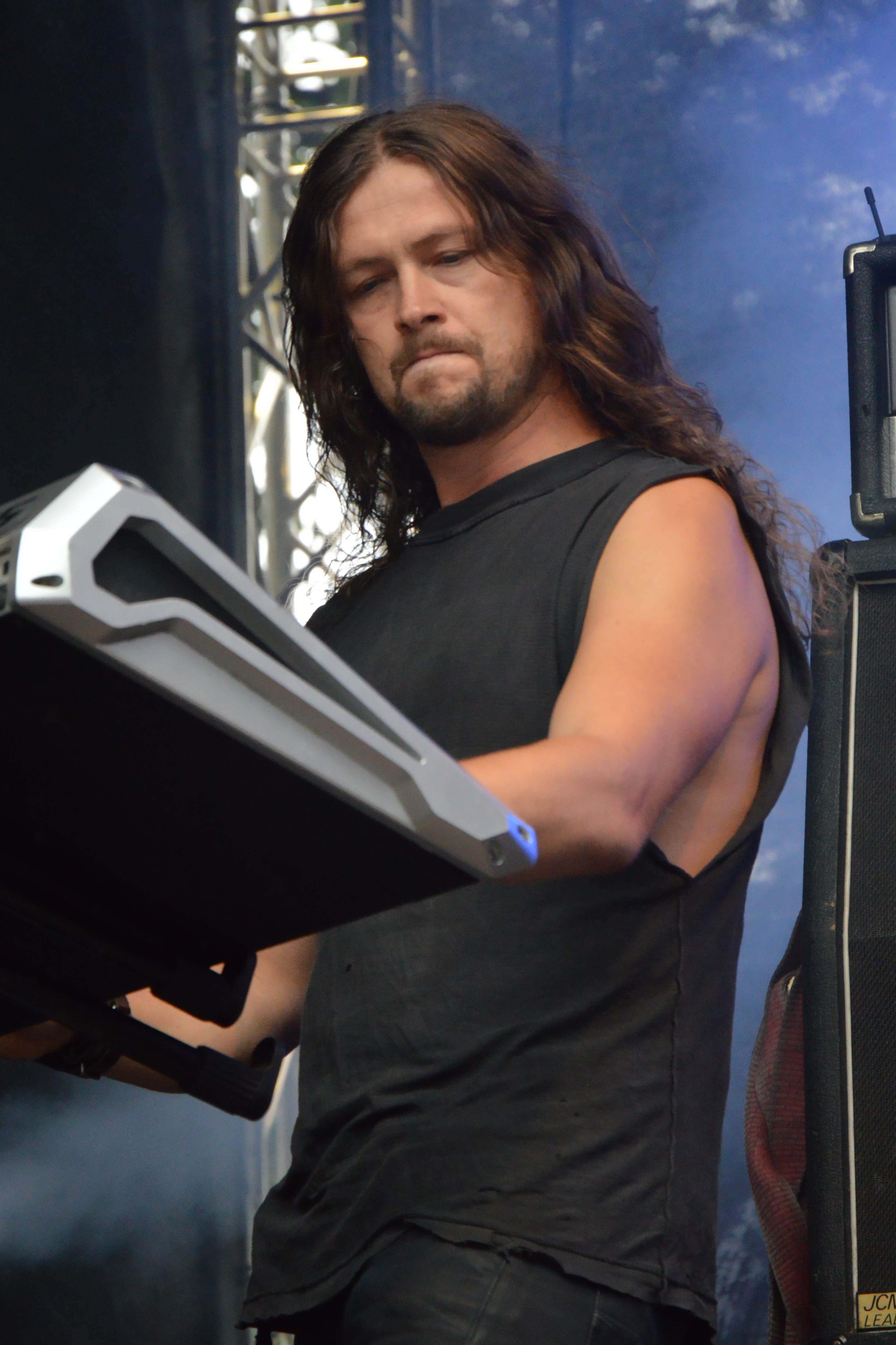 Wolfchant beim Turock Open Air 2013 in Essen